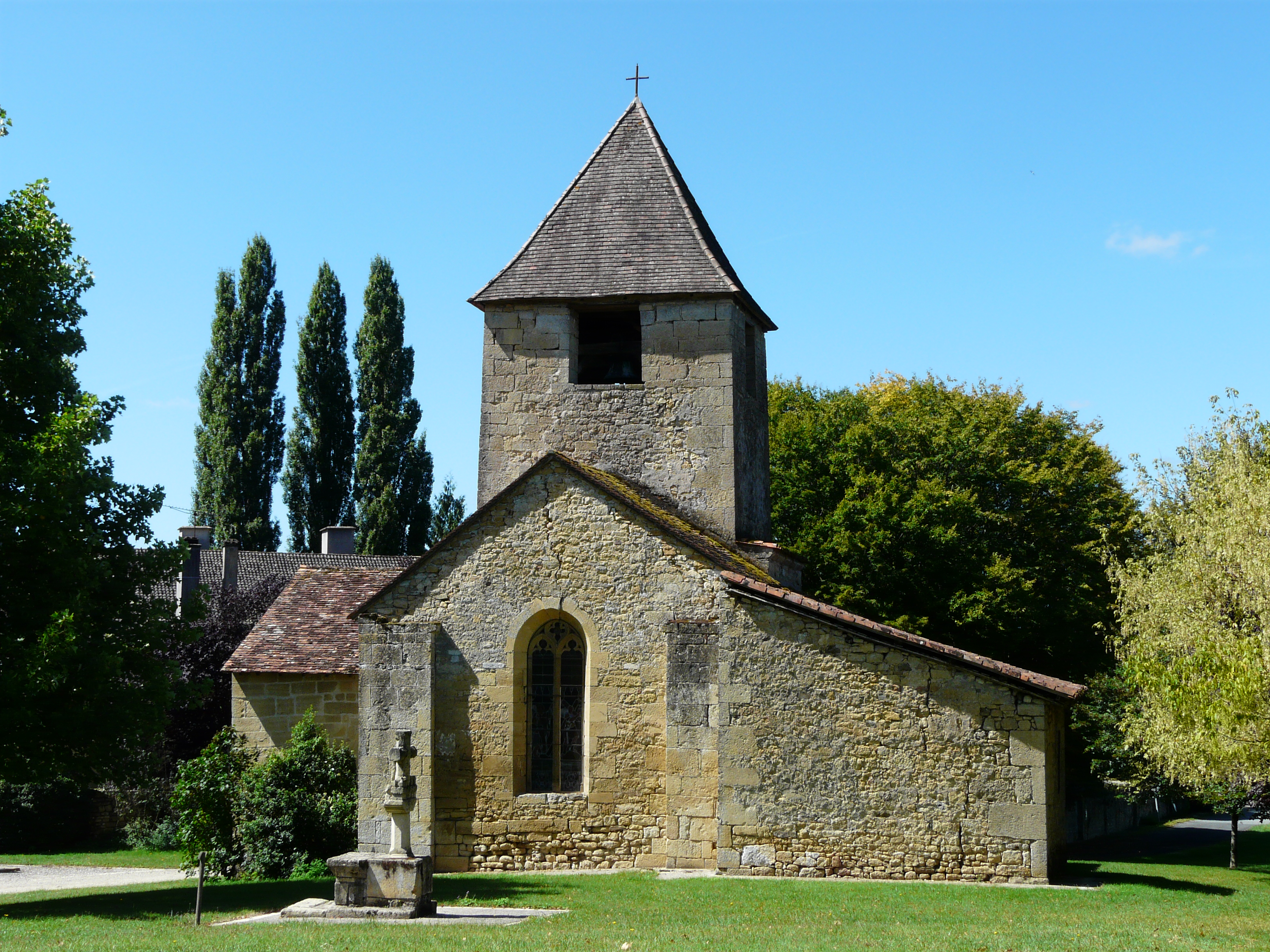 Le côté est de l'église Sainte-Croix de Nanthiat, Dordogne, France.